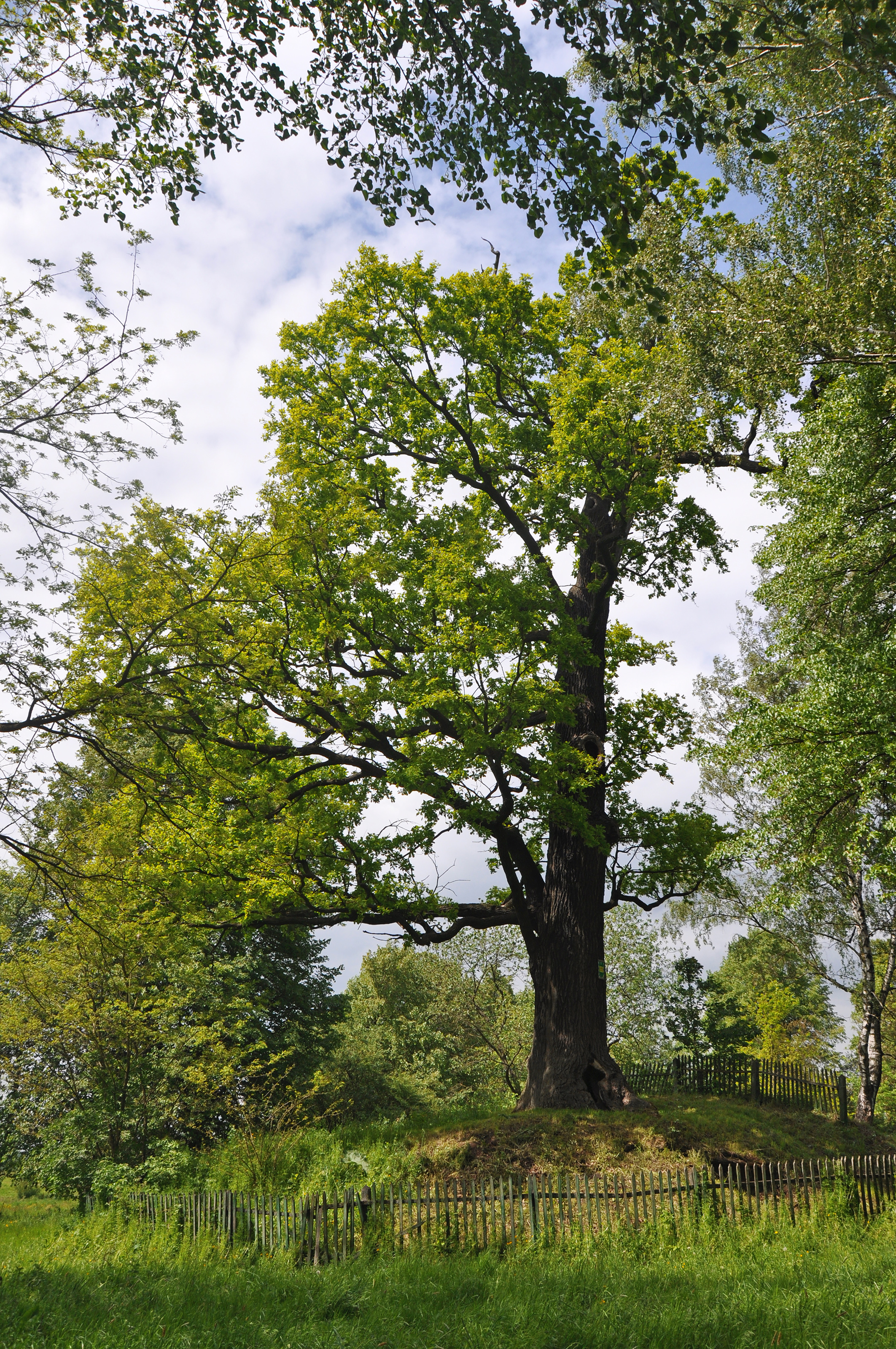 Дуб Виговського, Жидачівський район, с. Руда